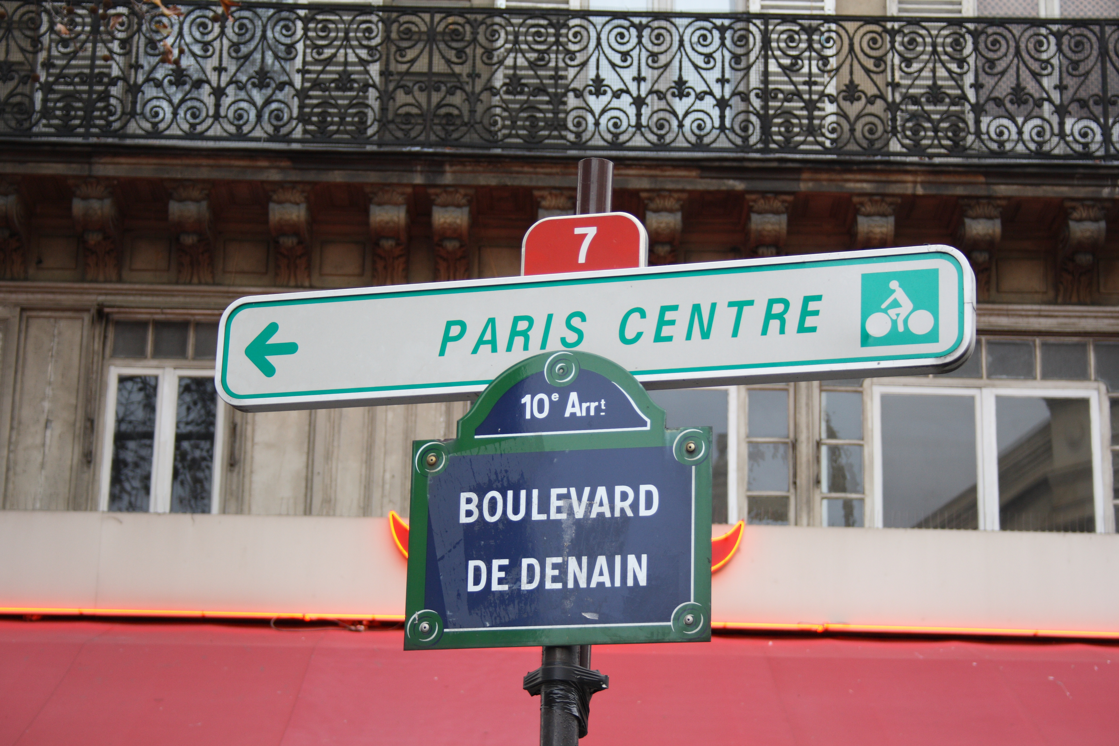 Straßenschild BOULEVARD DENAIN im 10. Arrondissement von Paris